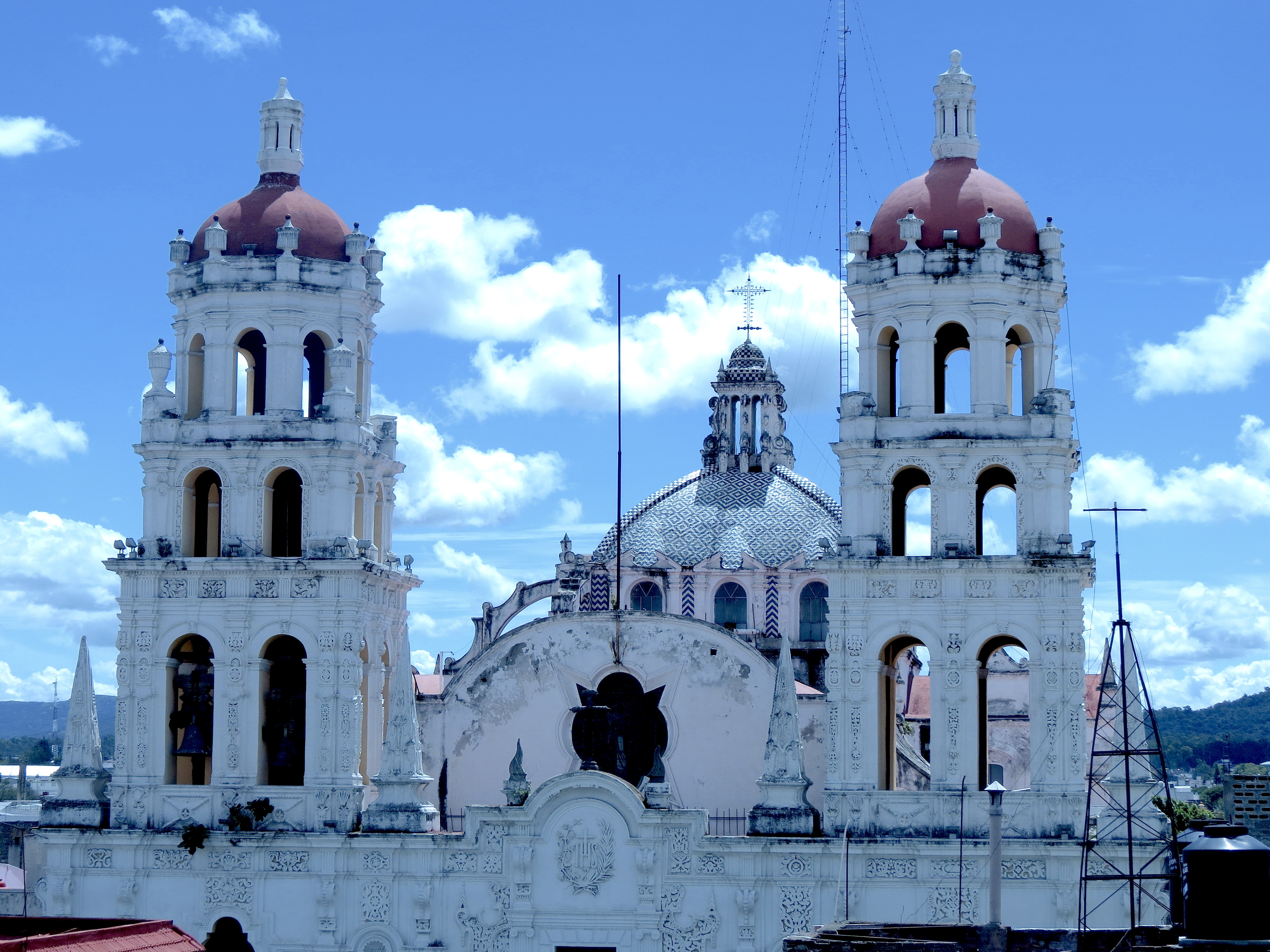 Torres del Templo de la Compañía, Puebla